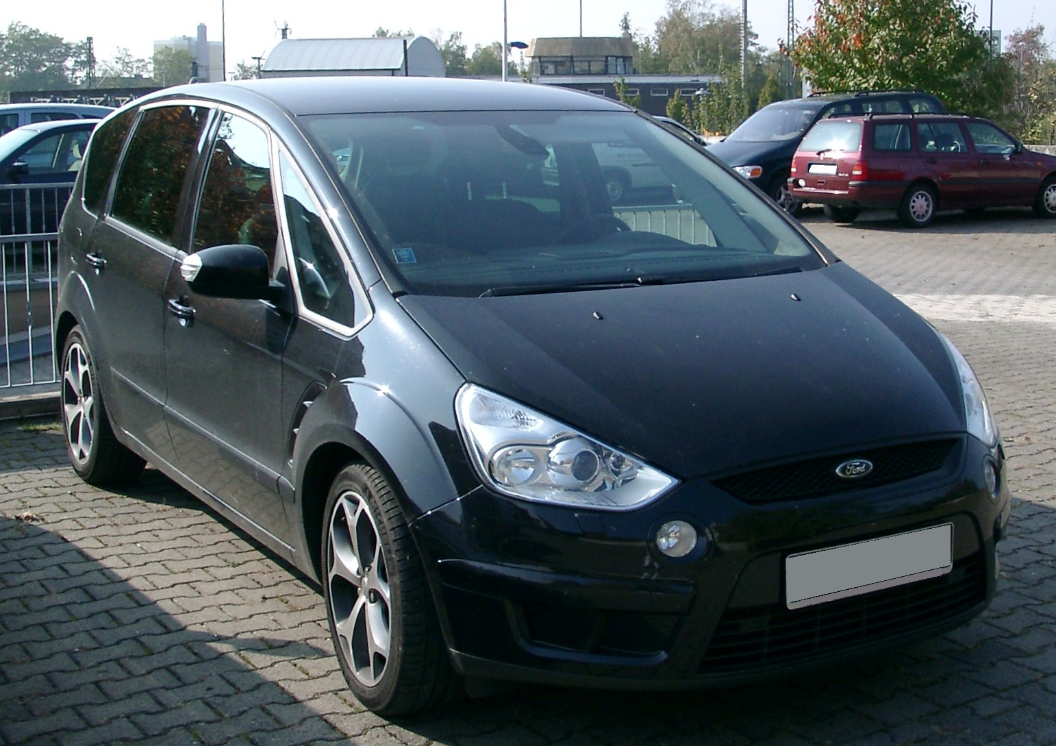 Ford S-Max